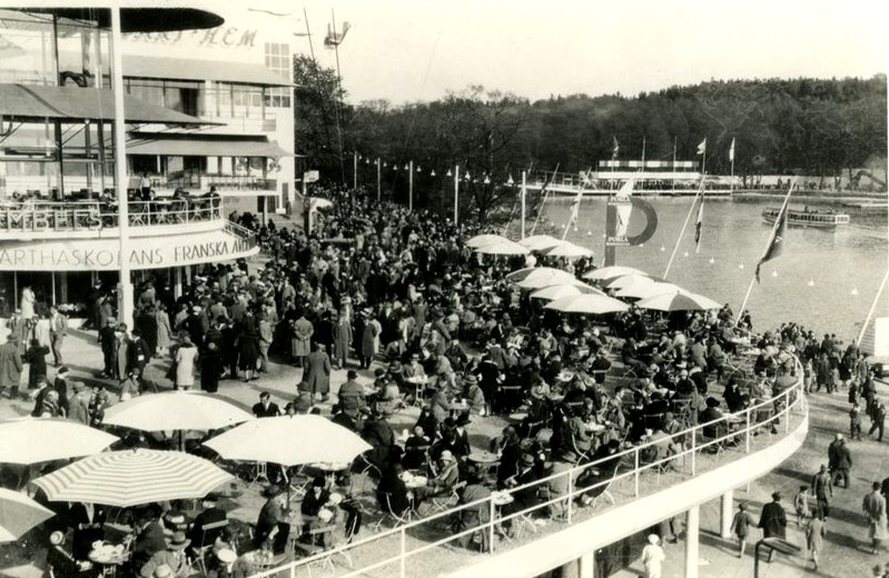 Stockholmsutställningen 1930